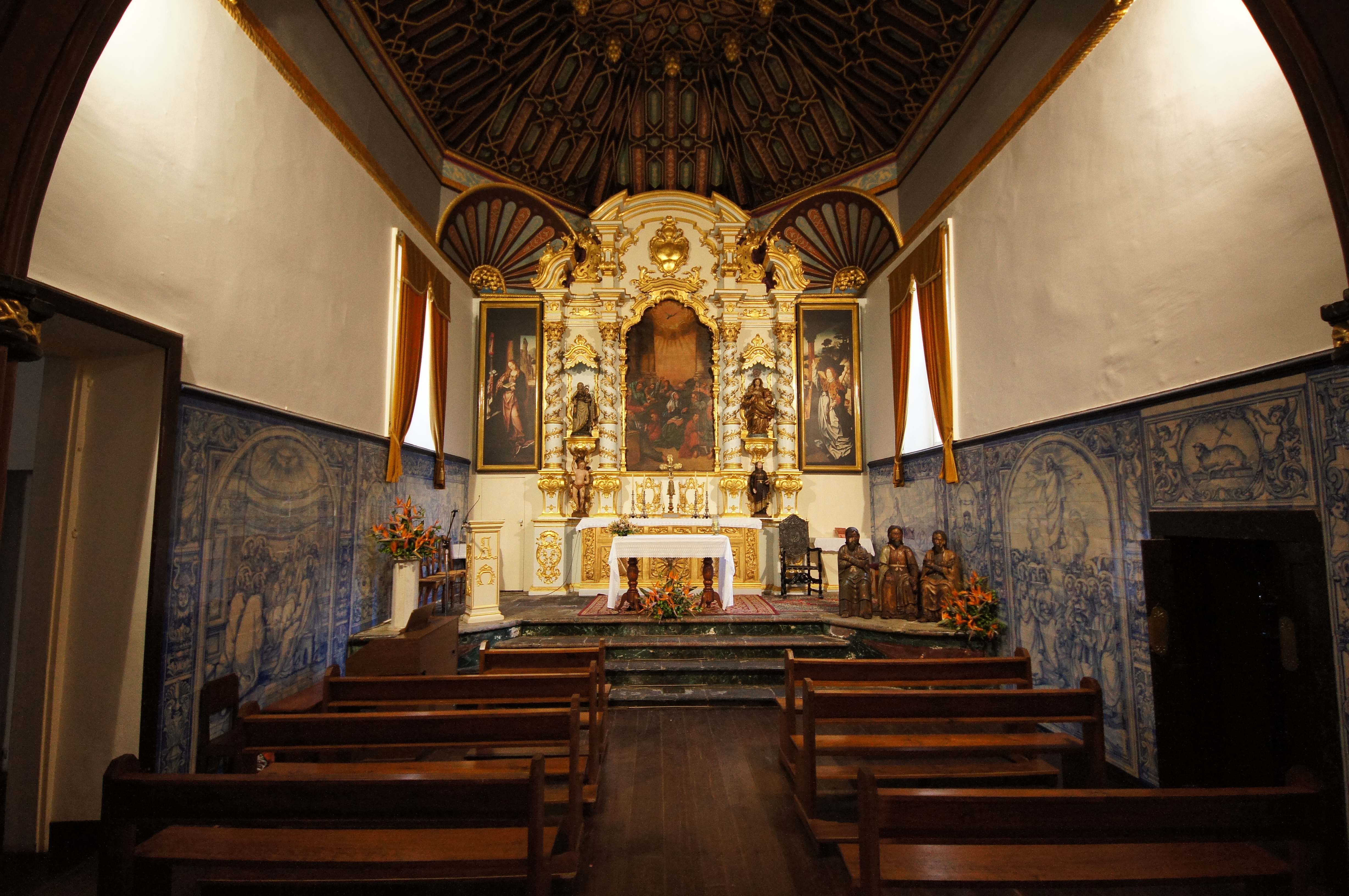 Capela mor da Igreja do Espírito Santo da Calheta, tecto moçarabe do século XVI